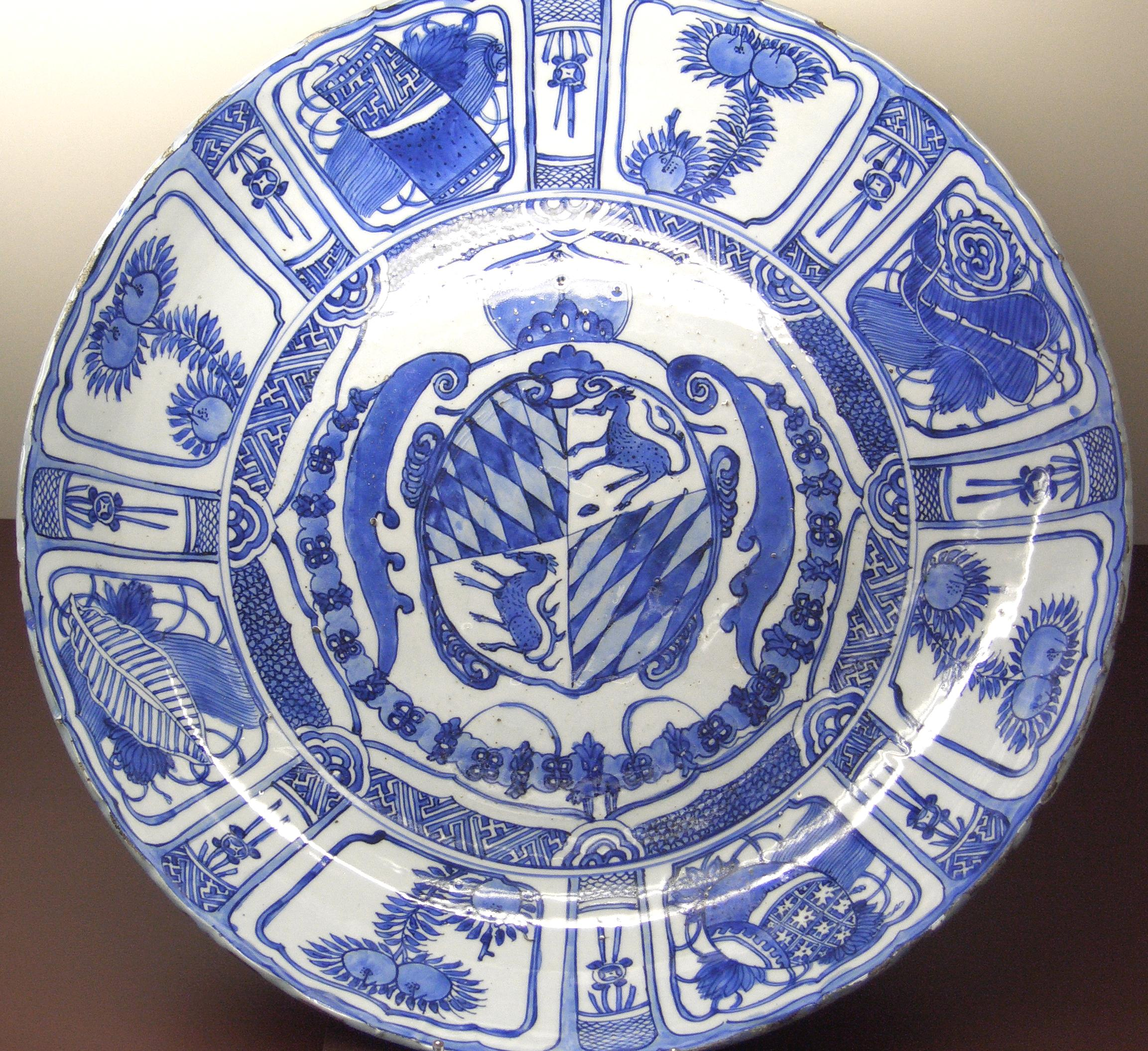 Chinese porcellain plate Made by order of the Bavarian House of Wittelsbach Wanli Period; Ming Dynasty Münchener Residenzmuseum Photographer: user:Dr. Meierhofer Date: 19.08.2006